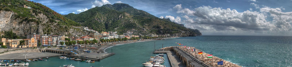 Panoramica di Maiori dalla curva del castello del marchese mezzacapo.